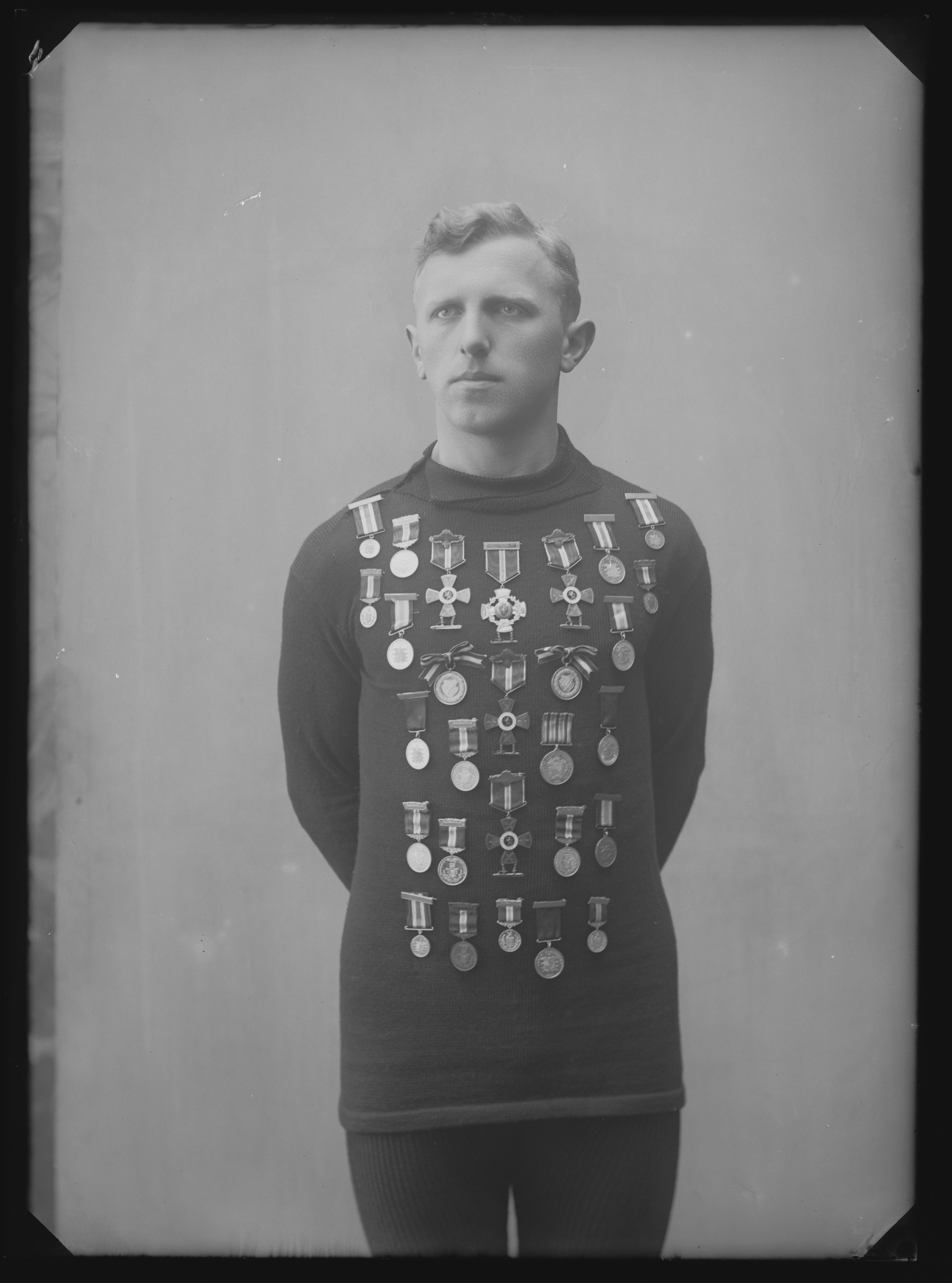 Bildet er hentet fra Nasjonalbibliotekets bildesamling. Anmerkninger til bildet var: Påskrift arkivark: Strøm Arkivnummer: 270